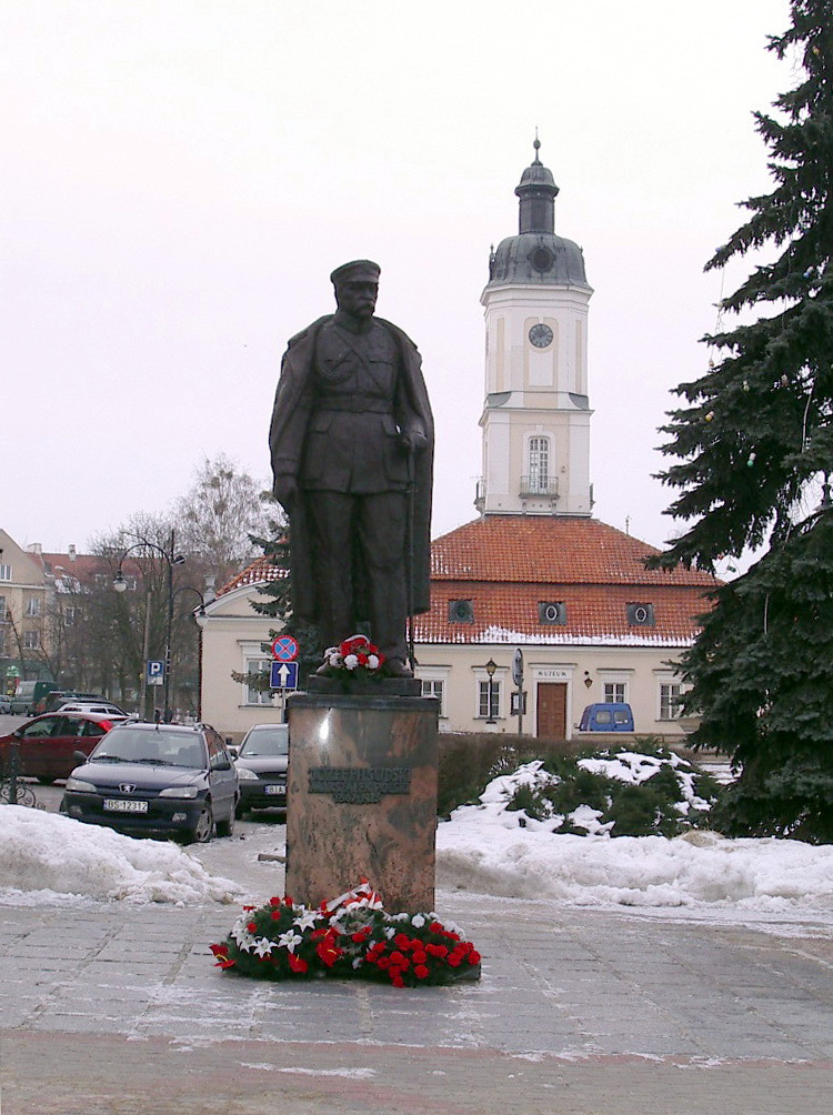 Pomnik J. Piłsudskiego w Białymstoku naprzeciw Ratusza. Lokalizacja z lat 1990-2008. Od 6 sierpnia 2008 przeniesiny naprzeciw Archiwum Państwowego mieszczącego się w Cekhauzie.